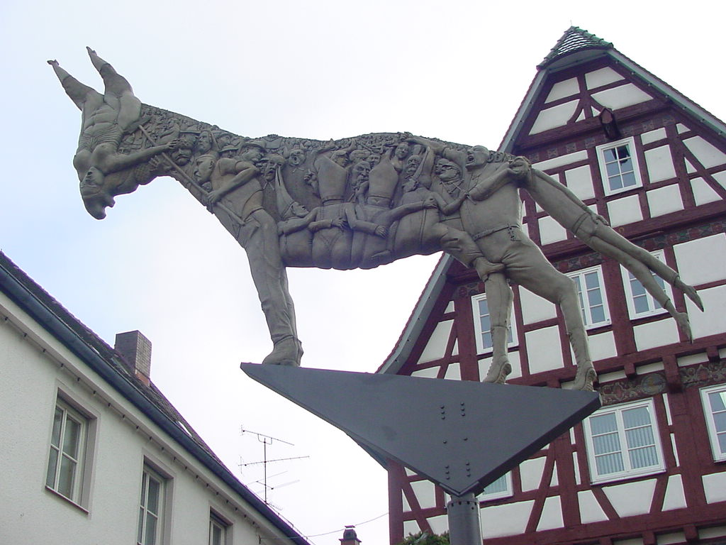 Die Eselskulptur (nach Wielands "Der Prozess um des Esels Schatten") von Peter Lenk auf dem Marktplatz von Biberach an der Riß. Das Foto wird mit Genehmigung von Weberberg.de, Website für Biberach, veröffentlicht. Die Seiten Biberach an der Riß und Esel verwenden dieses Bild.